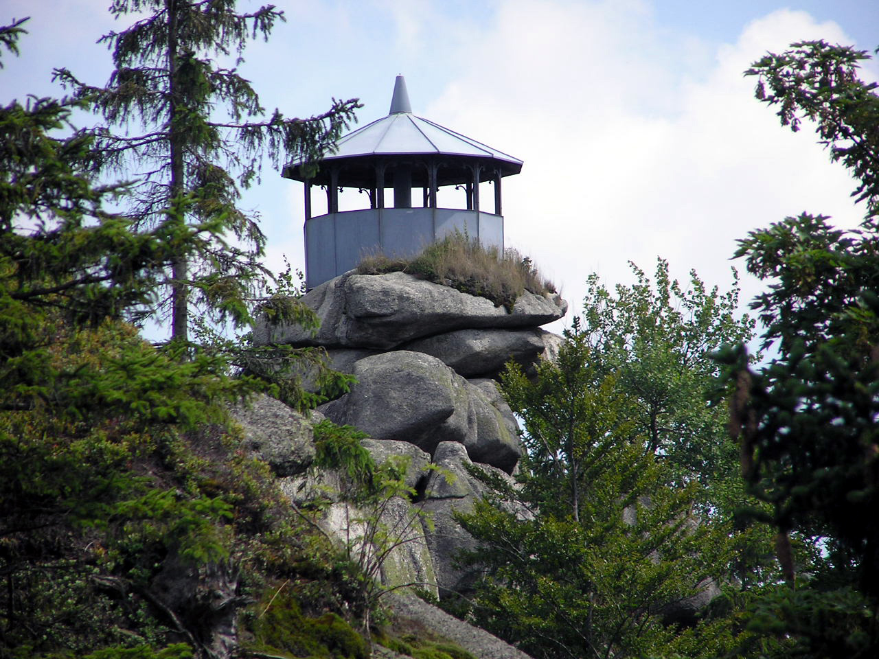 Description: Großer Waldstein, Aussichtspavillon Schüssel Source: selbst fotografiert Date: 19. August 2005 Author: Schubbay